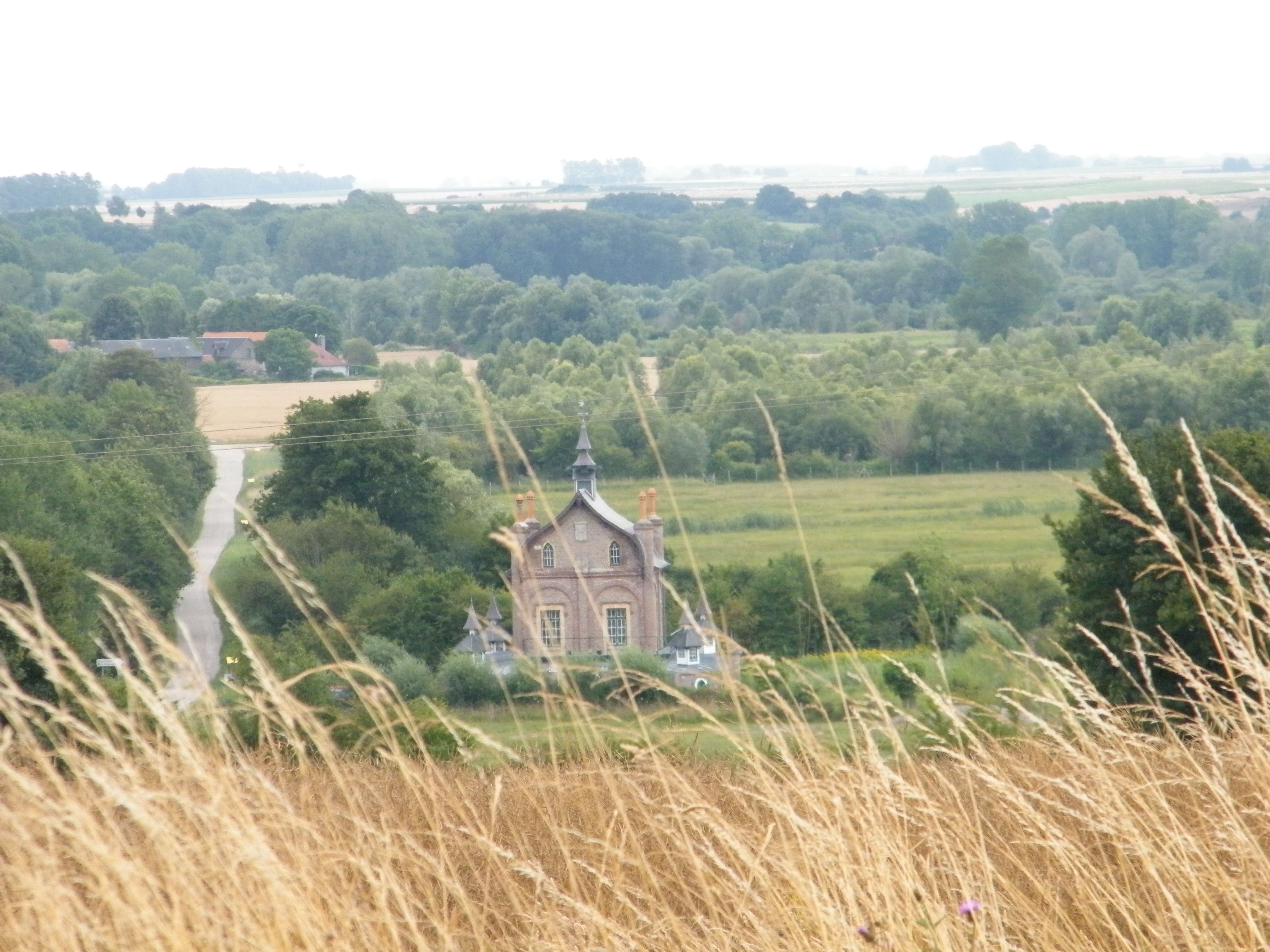 Port-le-Grand, Blanquetaque, Somme, chalet géré par le Syndicat mixte Baie de Somme - Grand Littoral Picard, site Ramsar...